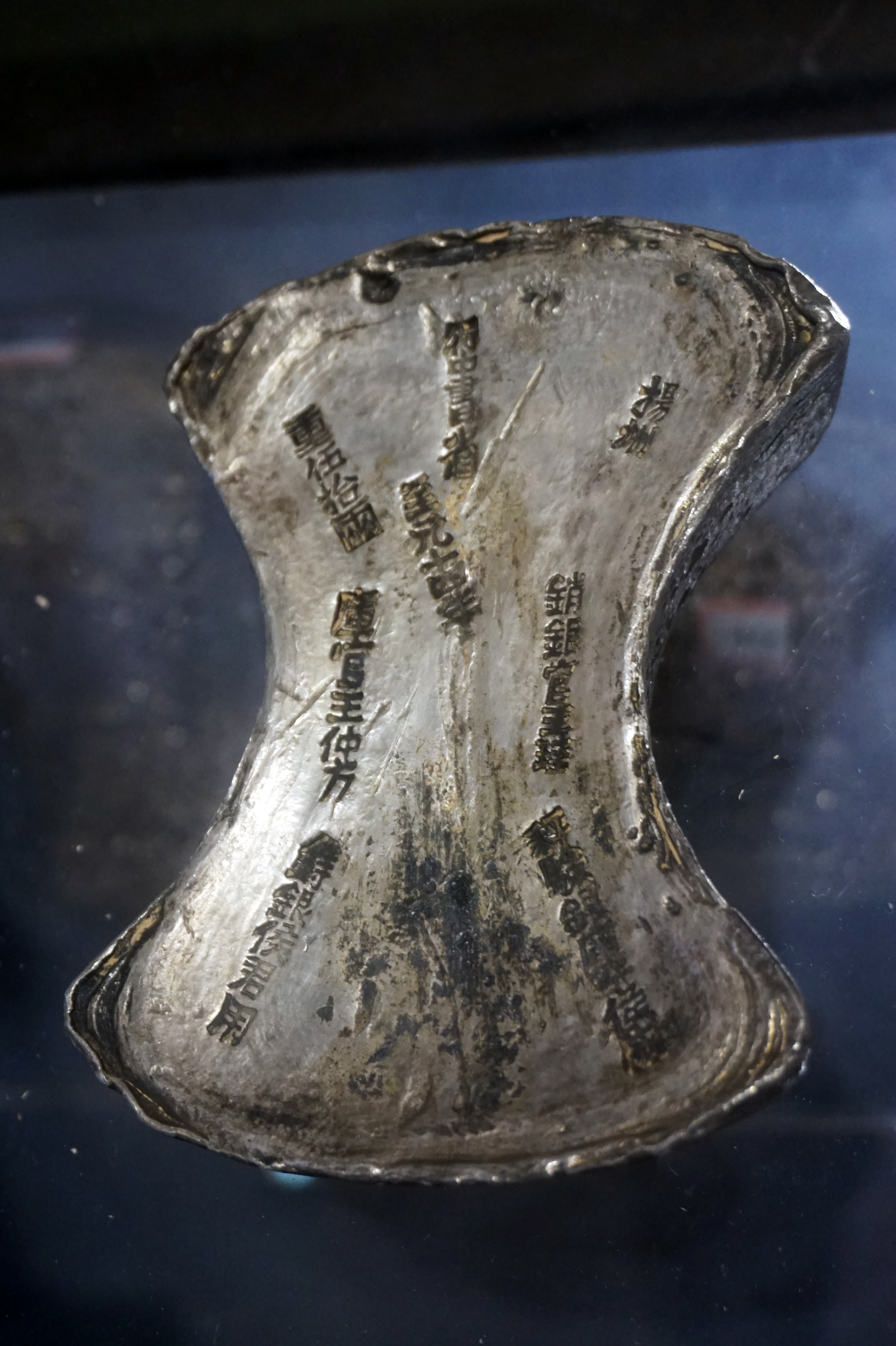 元至元十四年五十两银锭（“扬州元宝”）。中国财税博物馆藏。 “扬州 销银官王珪 称验银库子侯武 行中书省 至元十四年 重五十两 库官王仲方 铸银侯君用。”